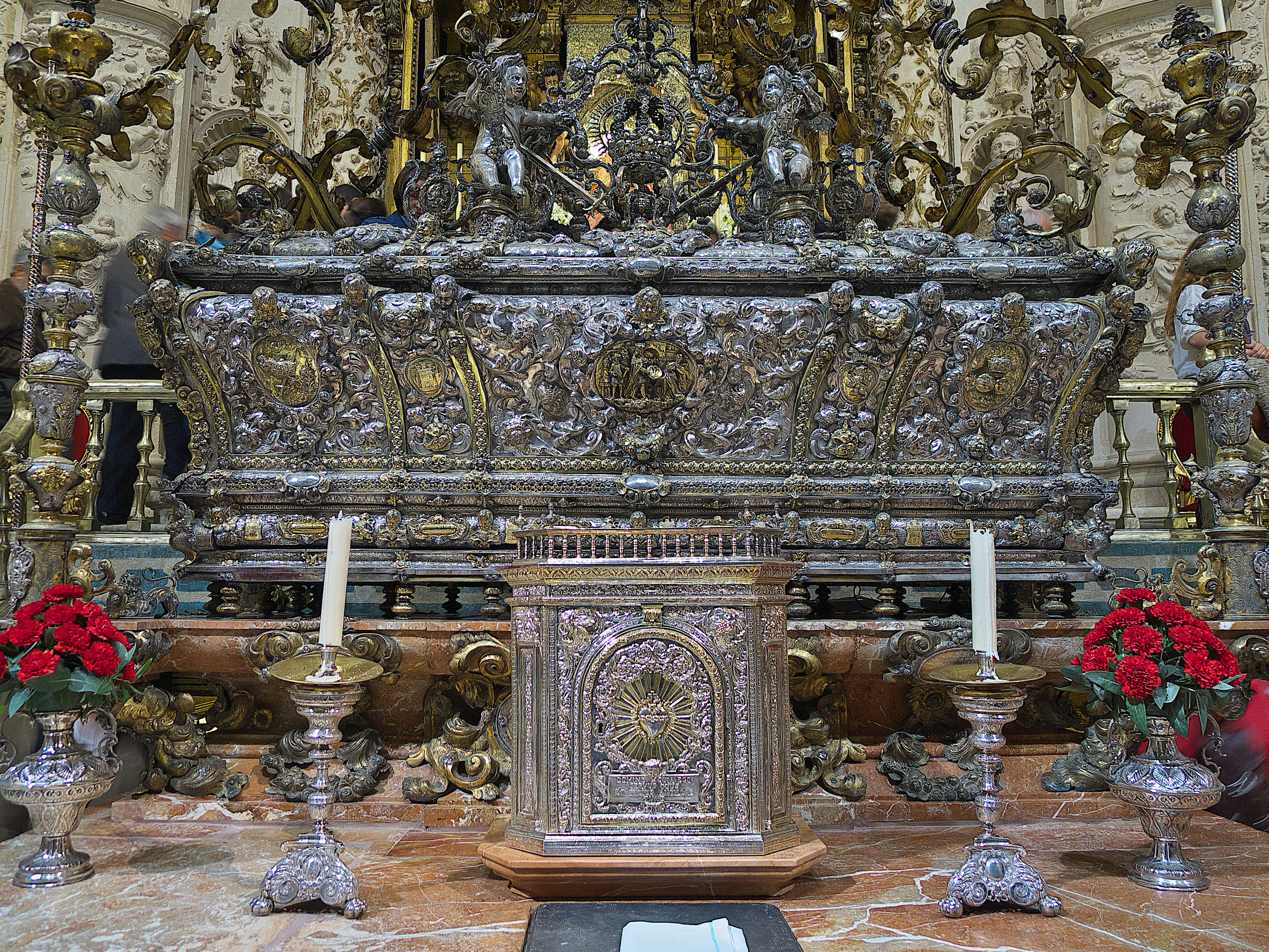 Capilla Real de Sevilla. El arzobispo de Sevilla, Jaime de Palafox y Cardona contrató en 1690 al orfebre Juan Laureano de Pina para que realizara la urna de plata que debía contener el cuerpo incorrupto del monarca castellano Fernando III el Santo, que había fallecido en 1252 y sido canonizado en 1671. La urna fue terminada en 1719, y constituye el más alto exponente de la orfebrería barroca española.